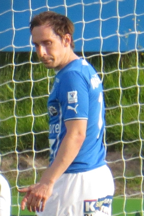 Mika Mäkitalo, suomalainen jalkapalloilija Rovaniemen Palloseuran joukkueessa kaudella 2015.